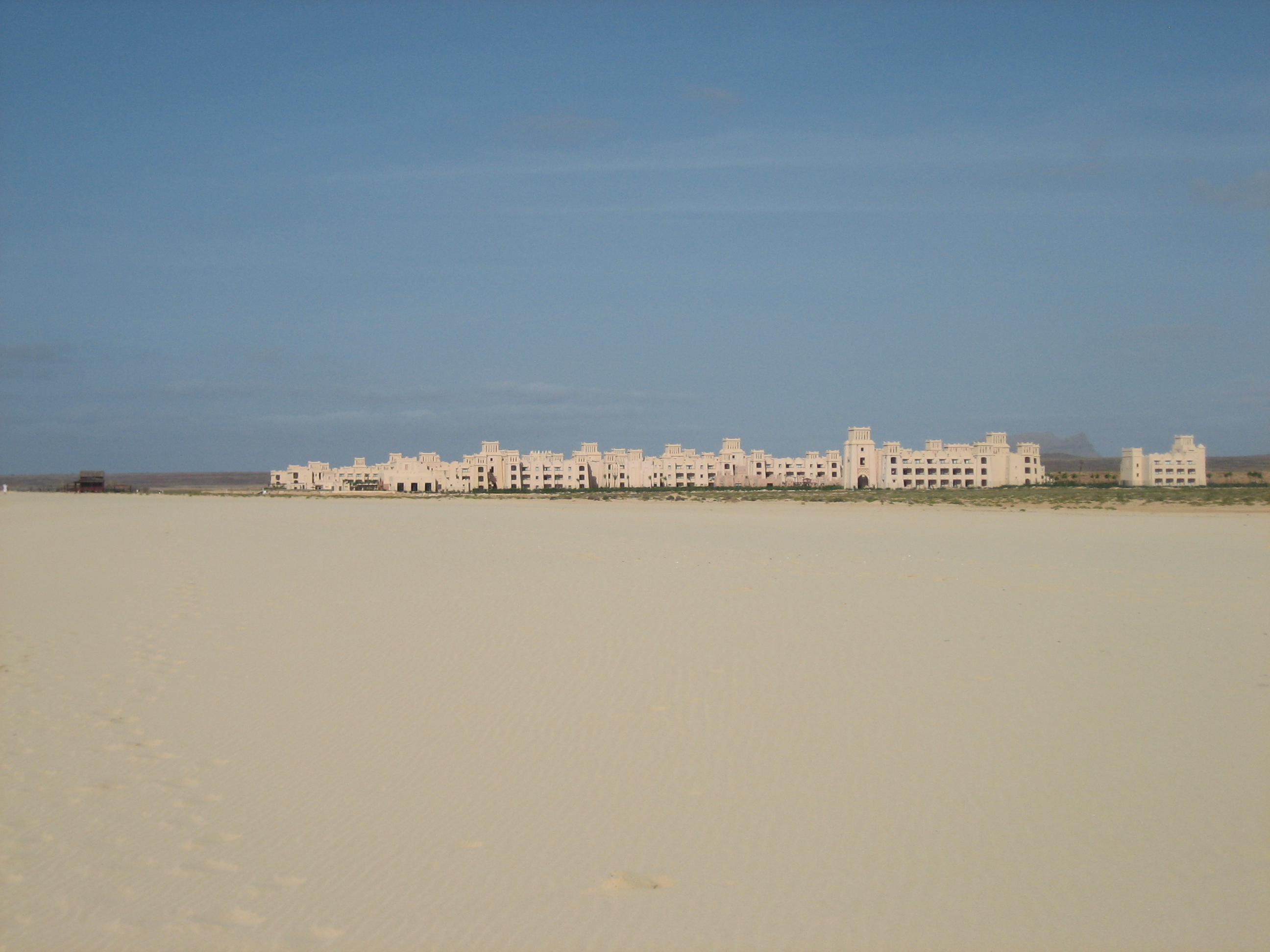 Boa Vista ( Riu Tuareg )